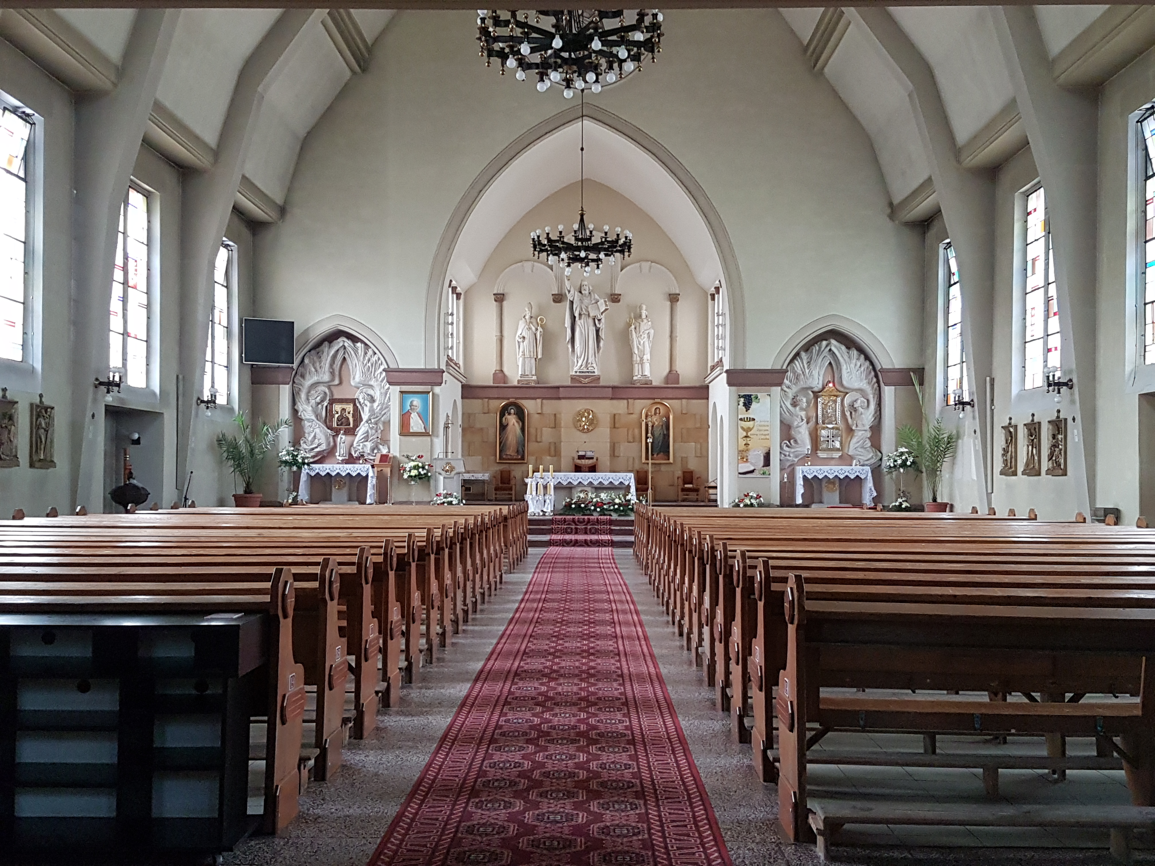 Zgorzelec